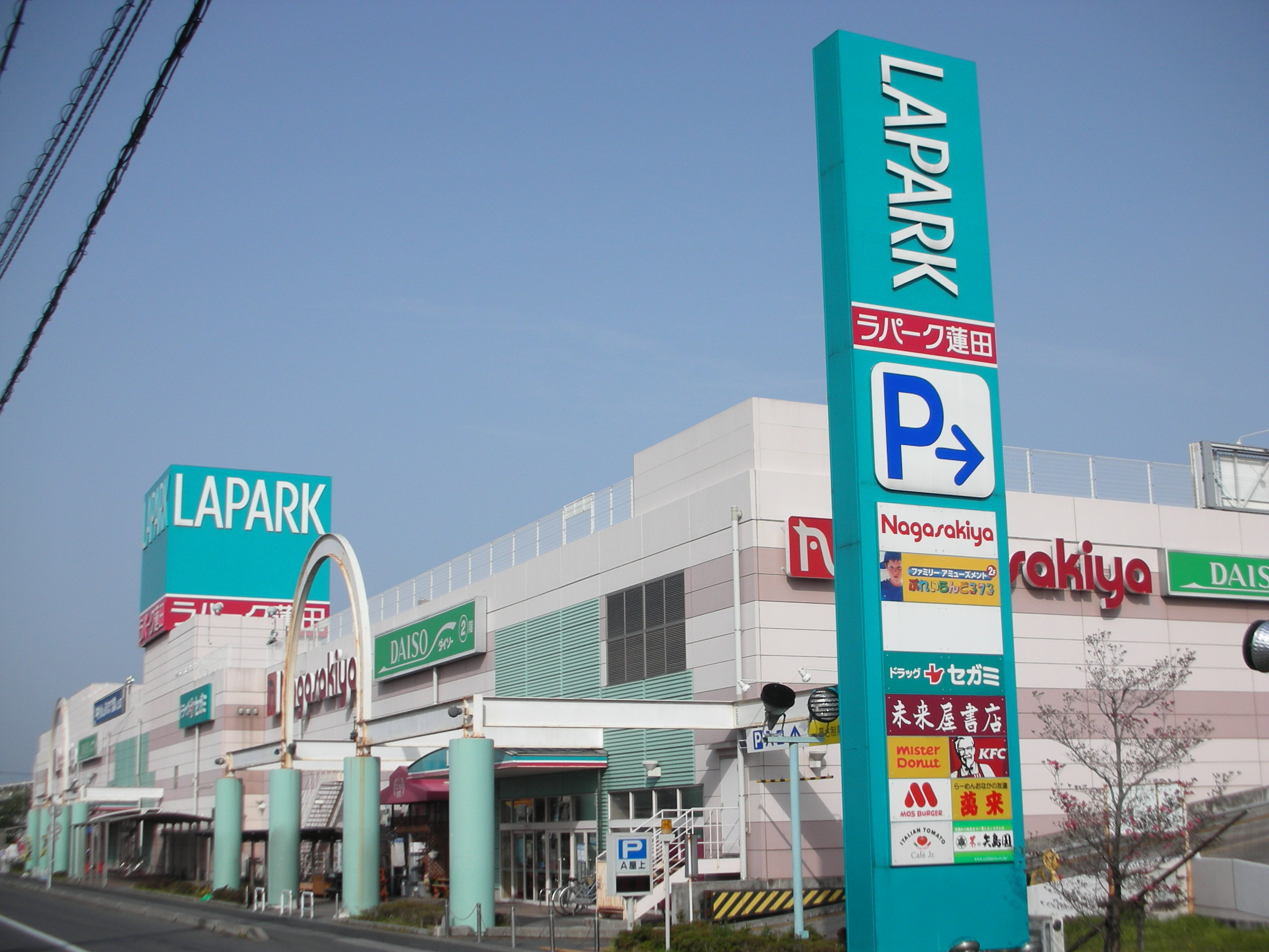 ラパーク蓮田の外観